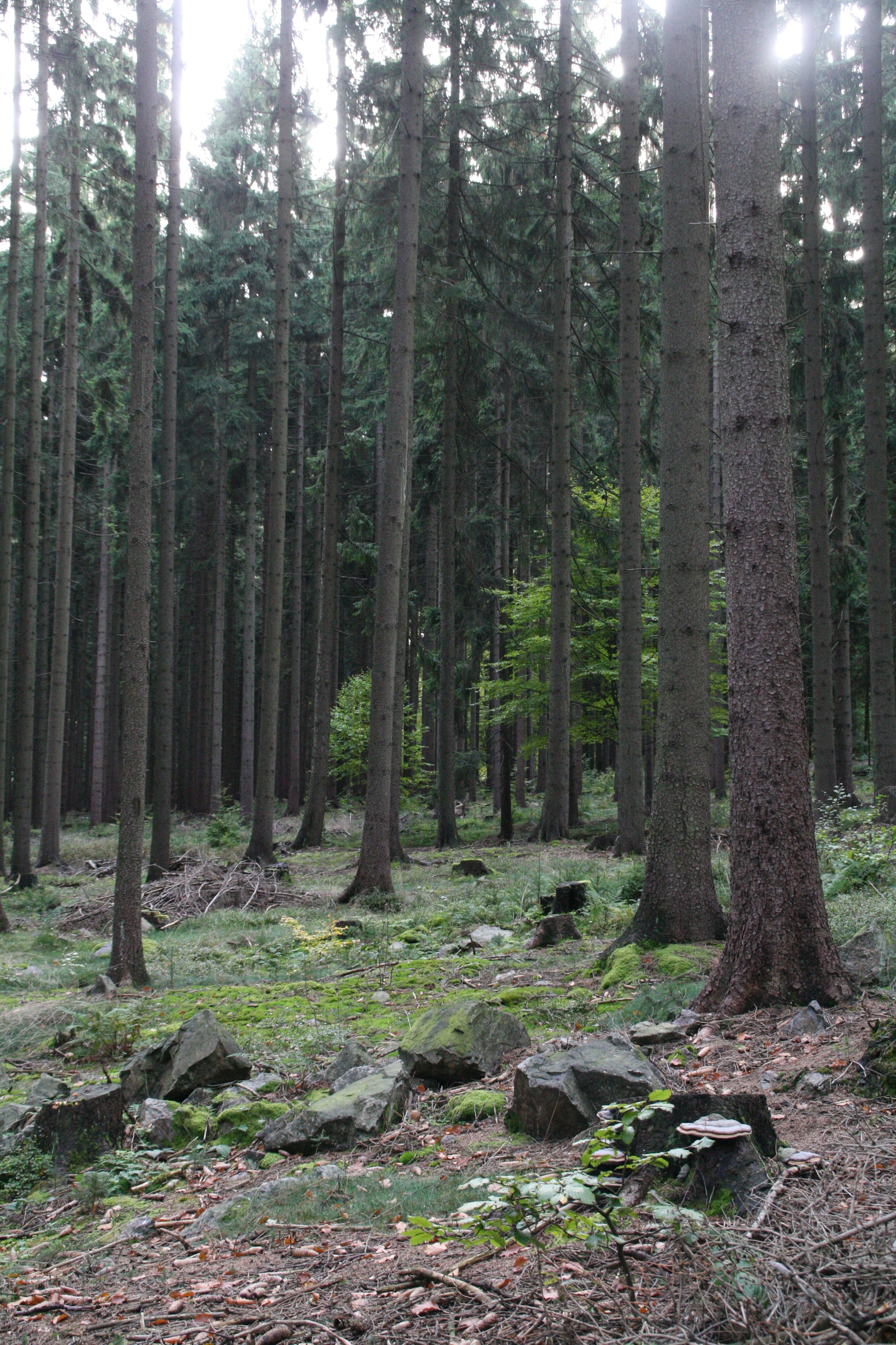 Správné zmlazování porostu listnatých stromů